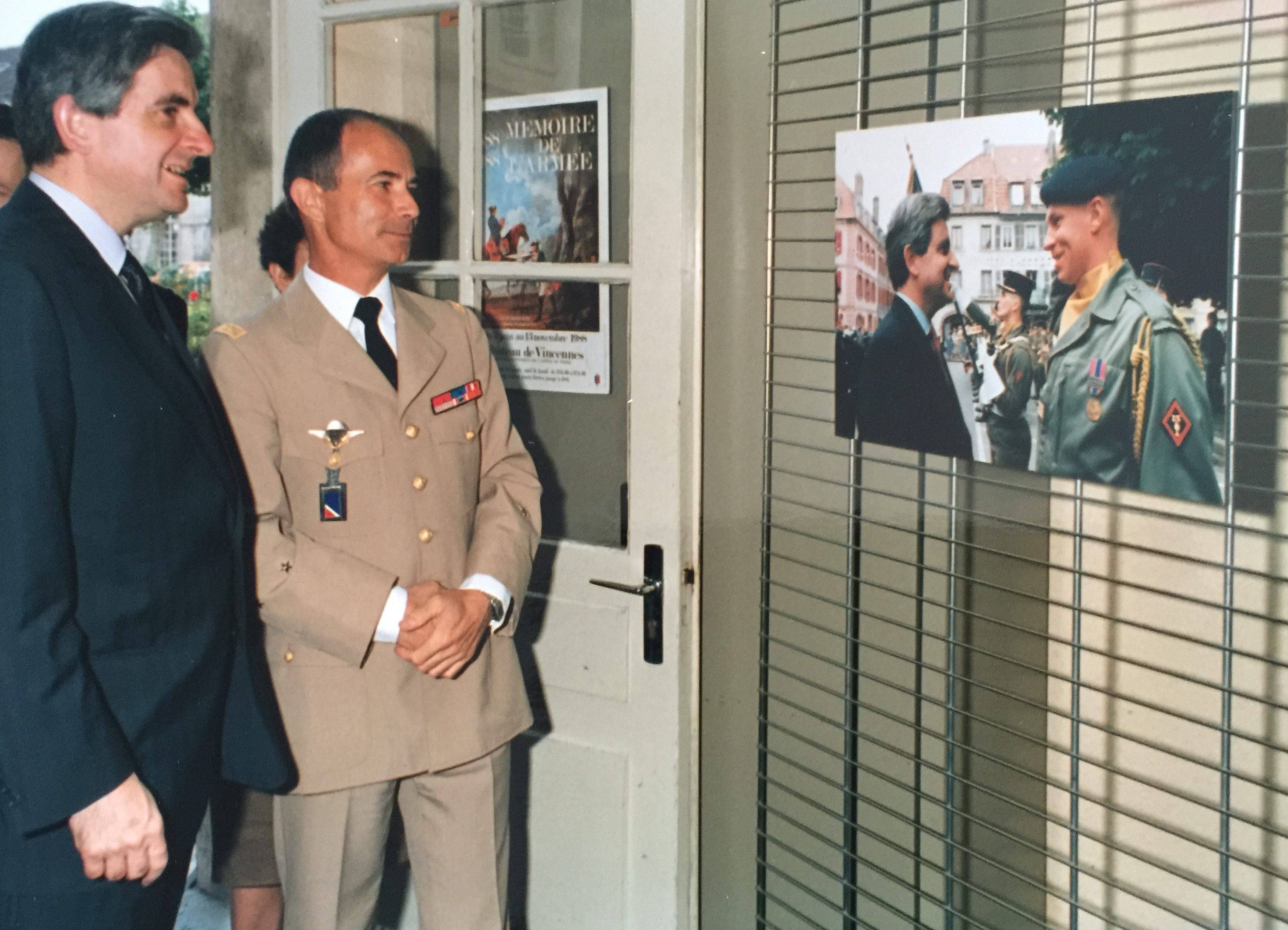 Monsieur Jean-Pierre Chevènement, Ministre de la défense avec le Général Jean-Bernard Pinatel lors de sa visite du SIRPA 1989